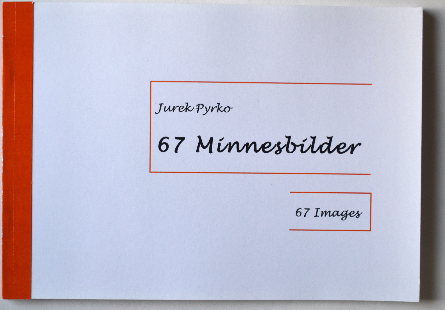 67 Minnesbilder